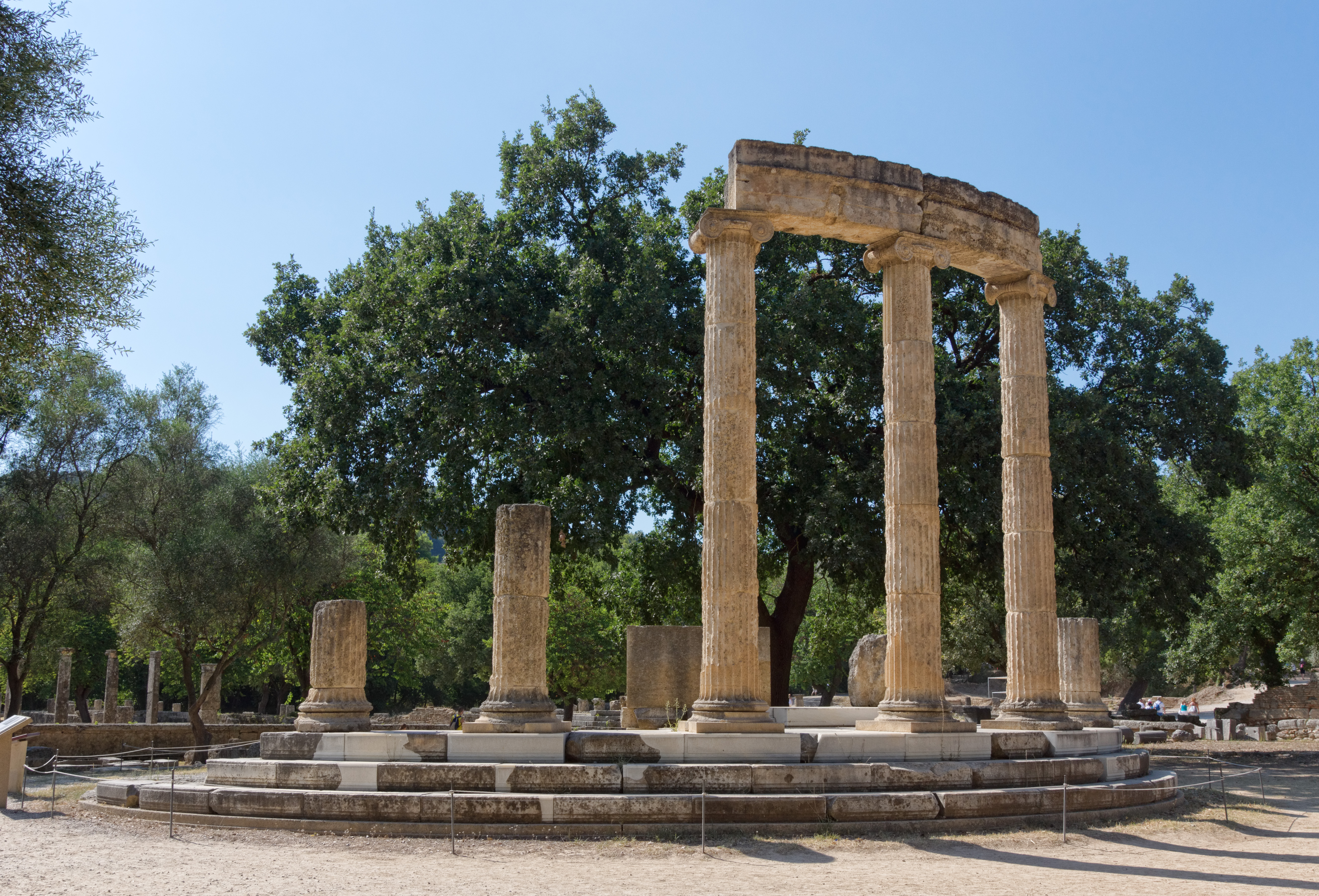 Philipeion à Olympie (Grèce)